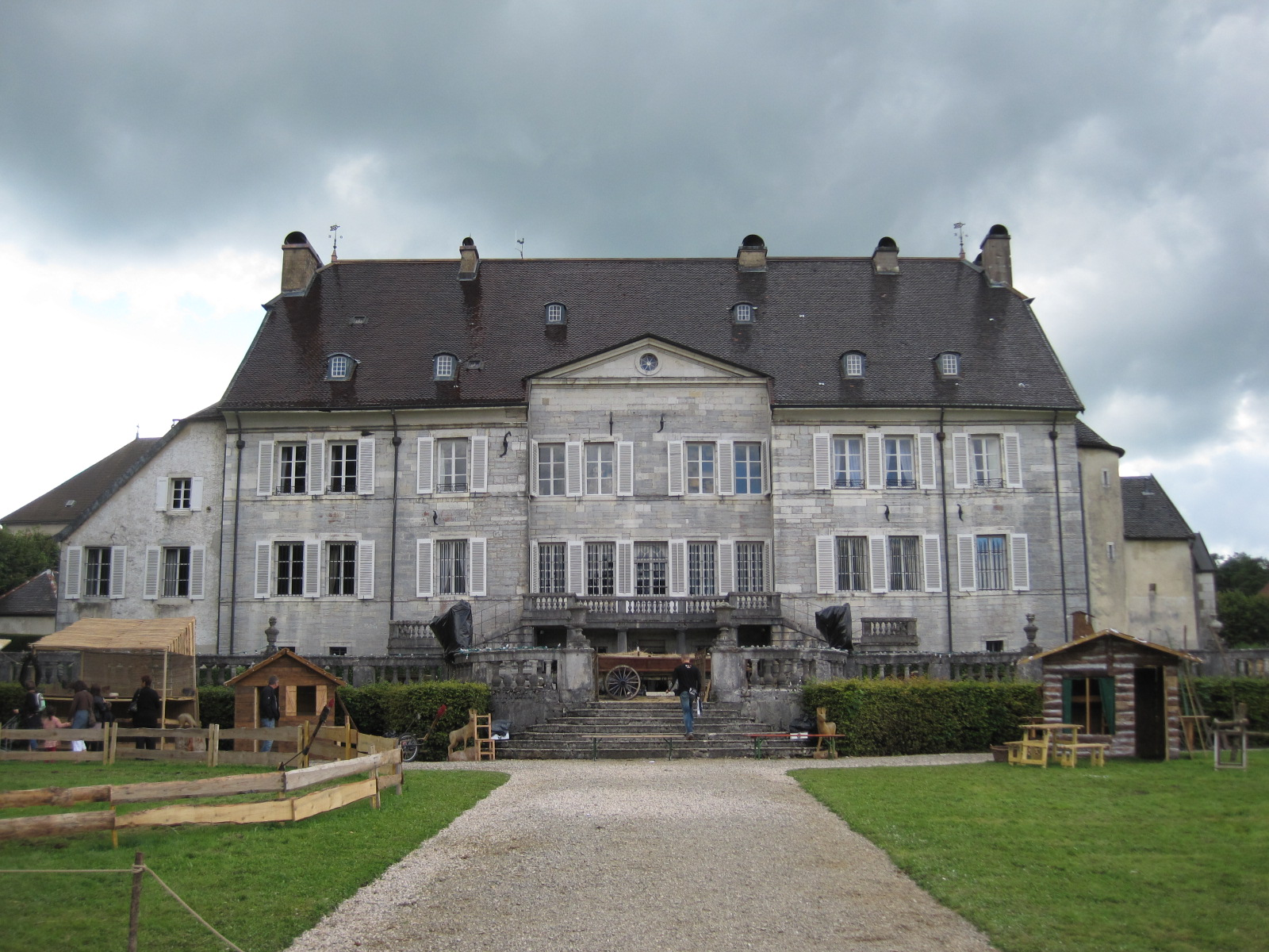 Château Montelambert - Maîche - Franche Comté - France